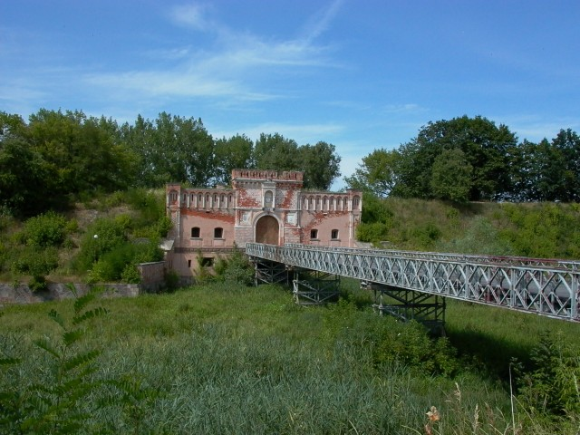 Fotografia przedstawia Bramę Lubelską Twierdzy Dęblin (zabytek nr rejestr. 758) Autor: Zbigniew Strucki